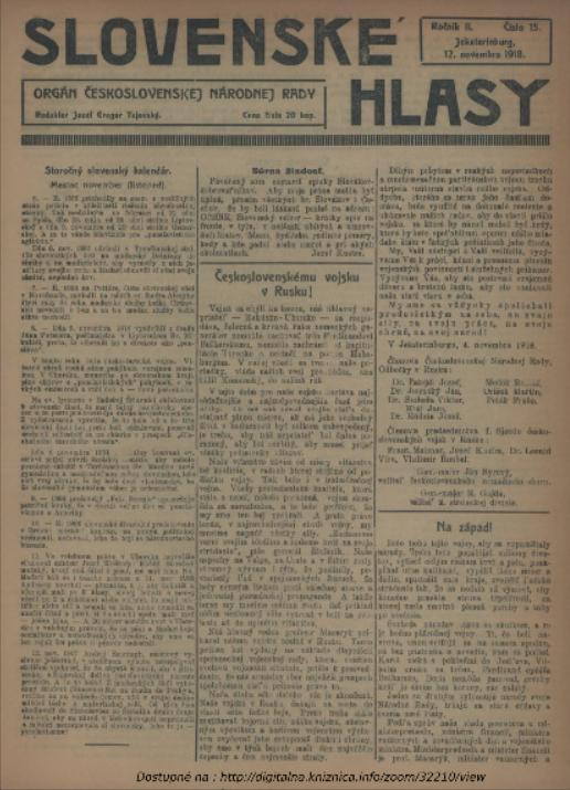 Titulný list periodika Slovenské hlasy vydávaneho v Rusku počas prvej svetovej vojny.